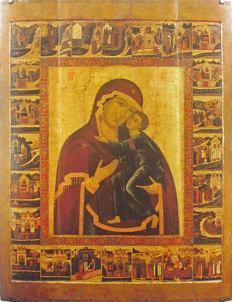 Богоматерь Толгская с клеймами (с изображениями событий из истории Толгского монастыря) Школа или худ. центр: Ярославль 1655 г. 157 × 122 см Ярославский художественный музей, Ярославль, Россия Инв. И-223